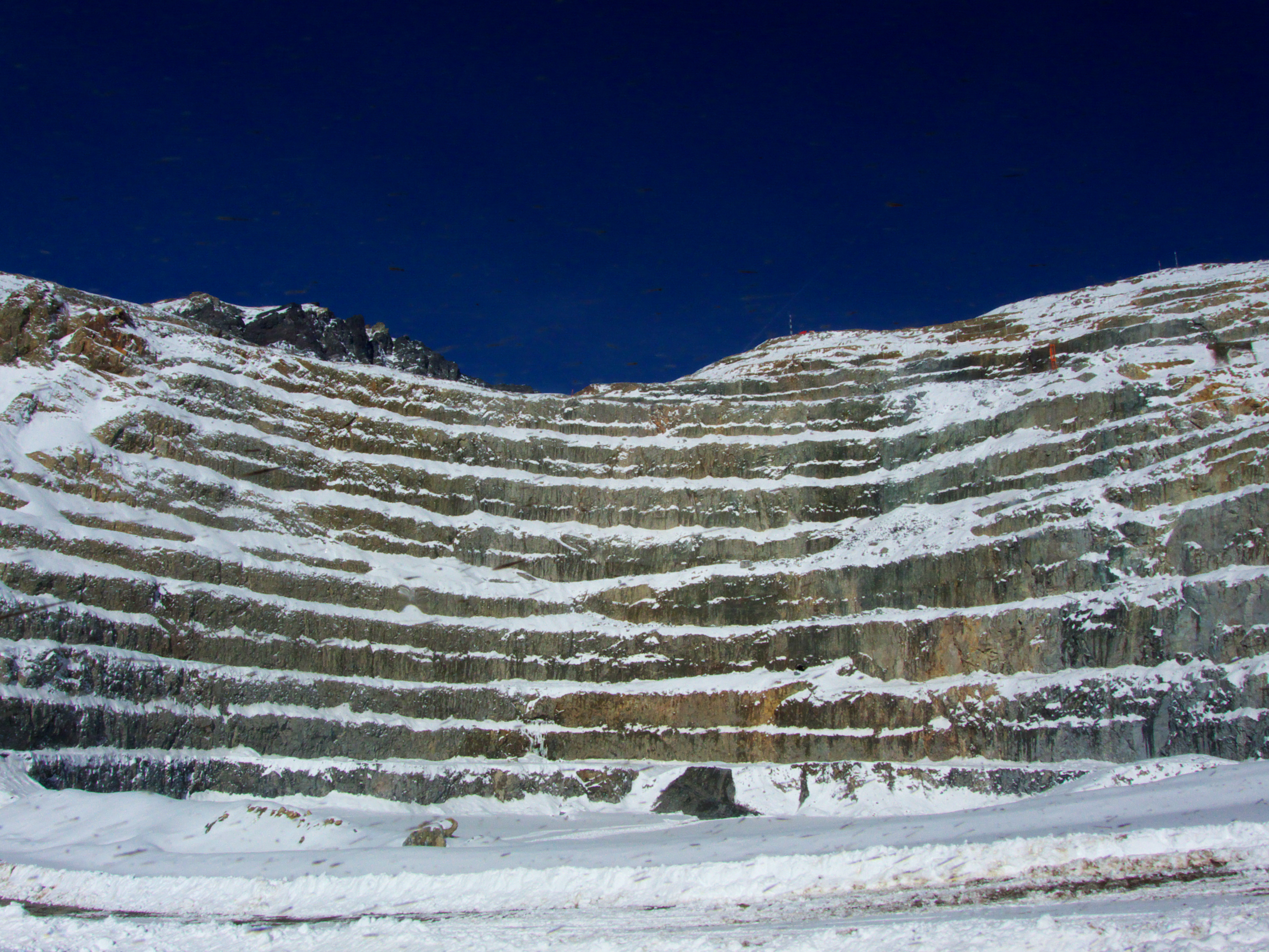 División Andina, Codelco Chile. 3.900 m.s.n.m.